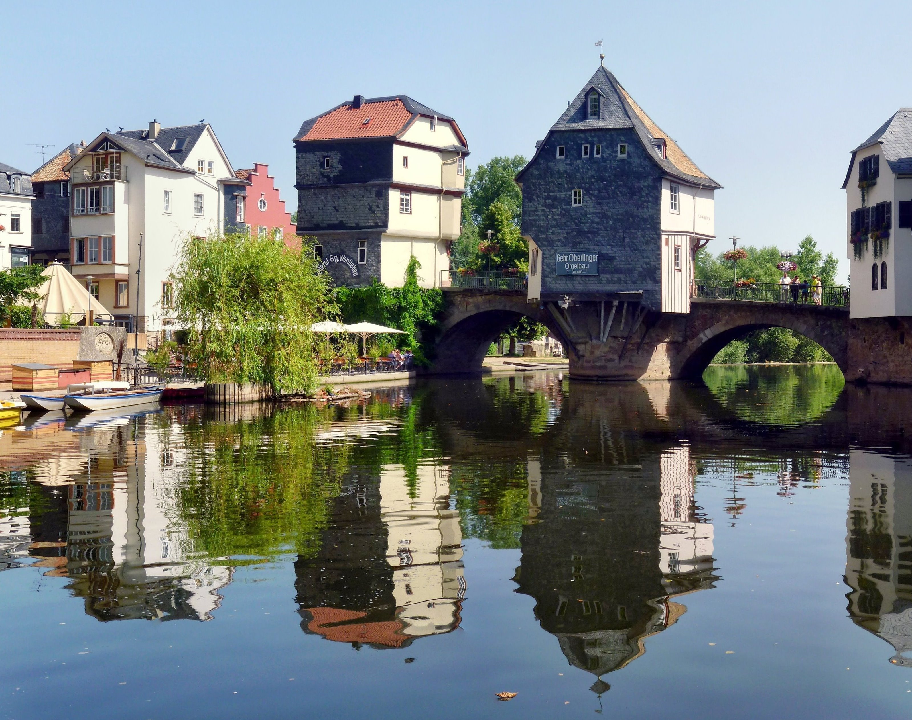 Die Alte Nahebrücke ist eine Brücke in Bad Kreuznach und gehört neben der Krämerbrücke in Erfurt und der Neckarbrücke in Esslingen zu den noch bestehenden Brücken, die mit Häusern bebaut ist. Die Steinbrücke hat eine Länge von 135 Meter und führt über die Nahe und dem Mühlenteich, einen Nebenarm der Nahe. Erbaut wurde die Brücke 1332 und diente als Ersatz für eine Holzbrücke.